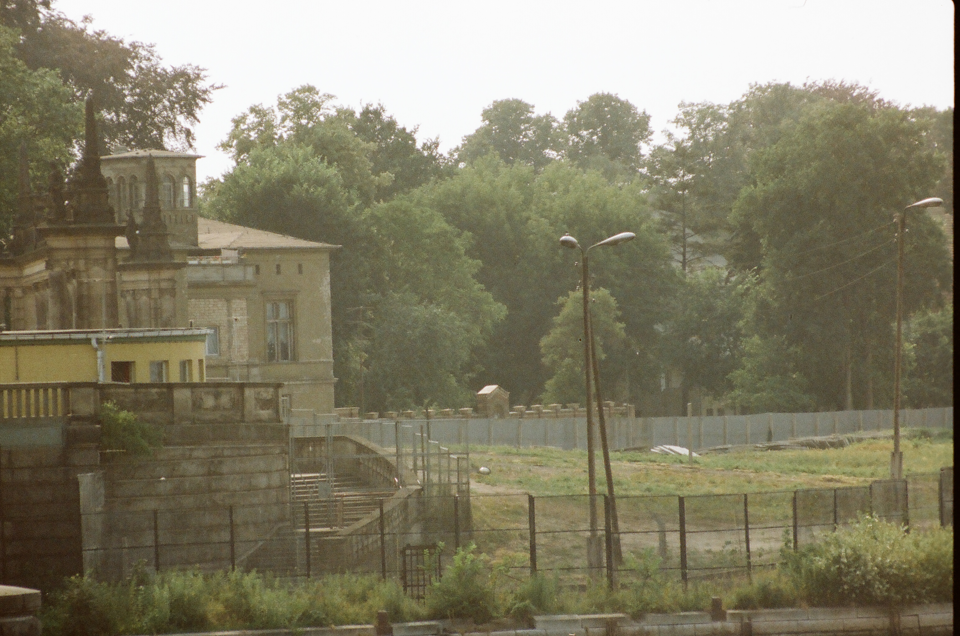 Grenzübergang Glienicker Brücke